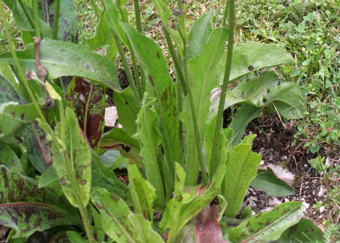 Hypochoeris_maculata (Costolina macchiata) Località : Giardino Botanico Alpino "Giangio Lorenzoni", Pian Cansiglio, Tambre d'Alpago (BL), 1000 m s.l.m.